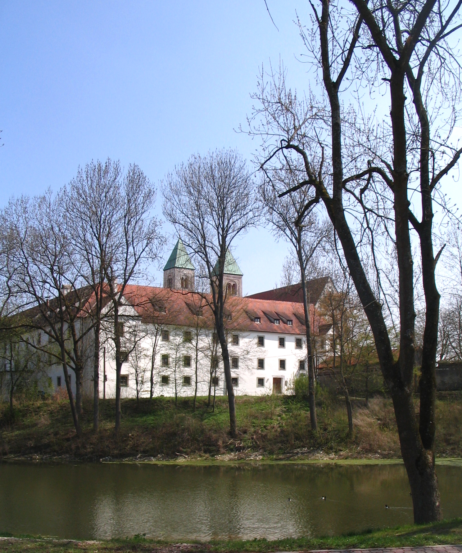 Biburg, Landkreis Kelheim, Niederbayern: ehemaliger Klosterkomplex